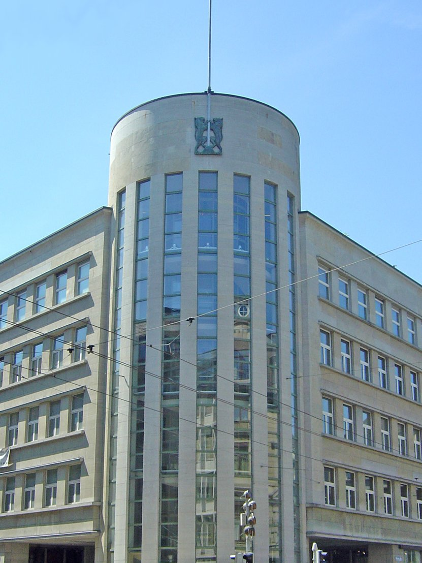 Die Alte Börse in Zürich vom Paradeplatz aus gesehen